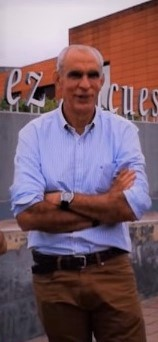 El mítico cancerbero del Real Zaragoza, Andoni Cedrún en el año 2019.